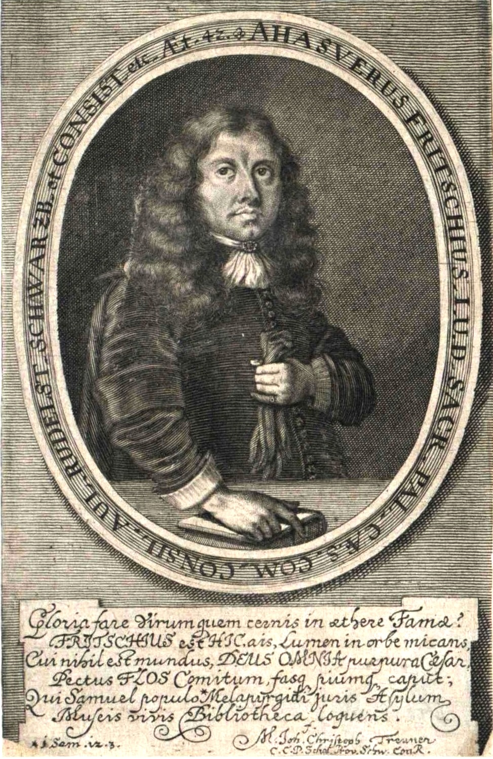 Ahasverus Fritsch (1629-1702) im Alter von 42 Jahren; lateinischer Lobspruch von Johann Christoph Treuner, Konrektor in Rudolstadt